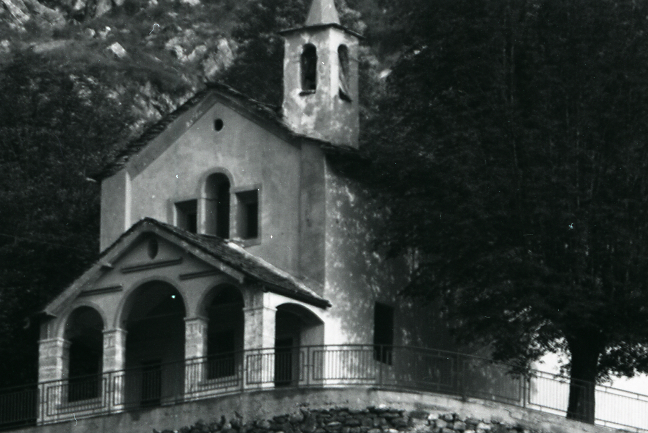 Serie fotografica : Anzola d'Ossola, 1972 / Paolo Monti. - Strisce: 5, Fotogrammi complessivi: 26 : Negativo b/n, gelatina bromuro d'argento/ pellicola ; 35 mm. - ((Sul portanegativi: NIKON PanF e iscrizione documentaria manoscritta a penna nera "molto mediocri, forse mosse". - Fonte: Agenda di Paolo Monti: Leica 1501-3000 Controllo numerazione (1950-1978), presso Archivio Paolo Monti